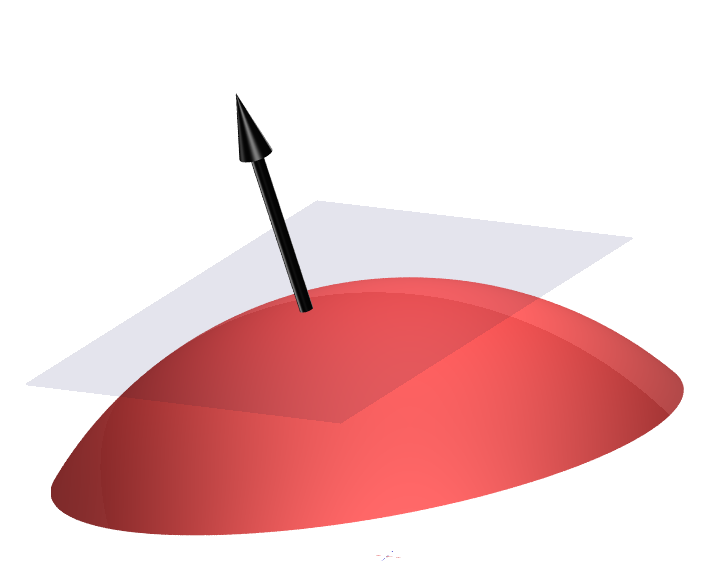 Ytnormal